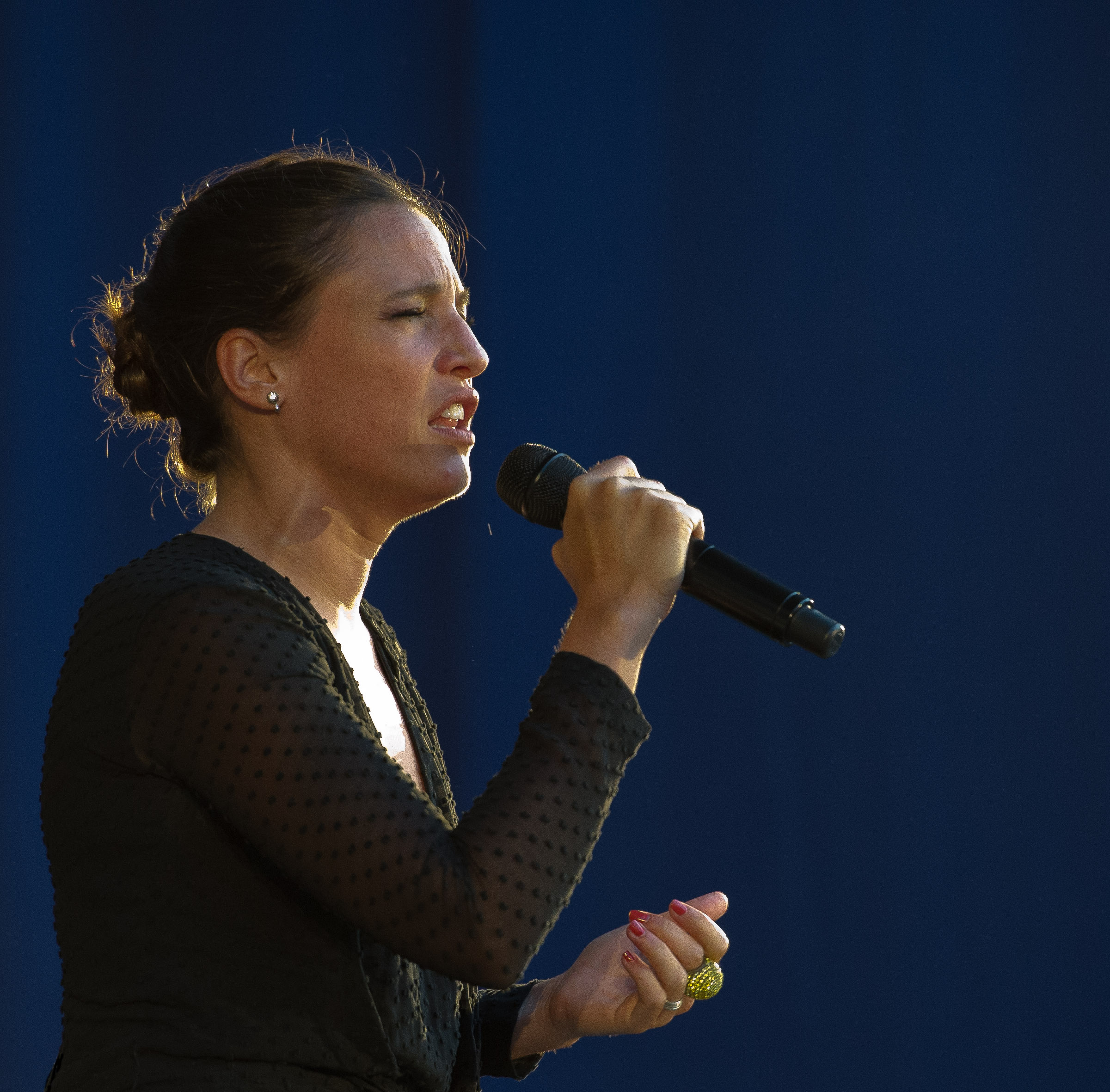 Carminho 2012 live im Palmengarten Frankfurt